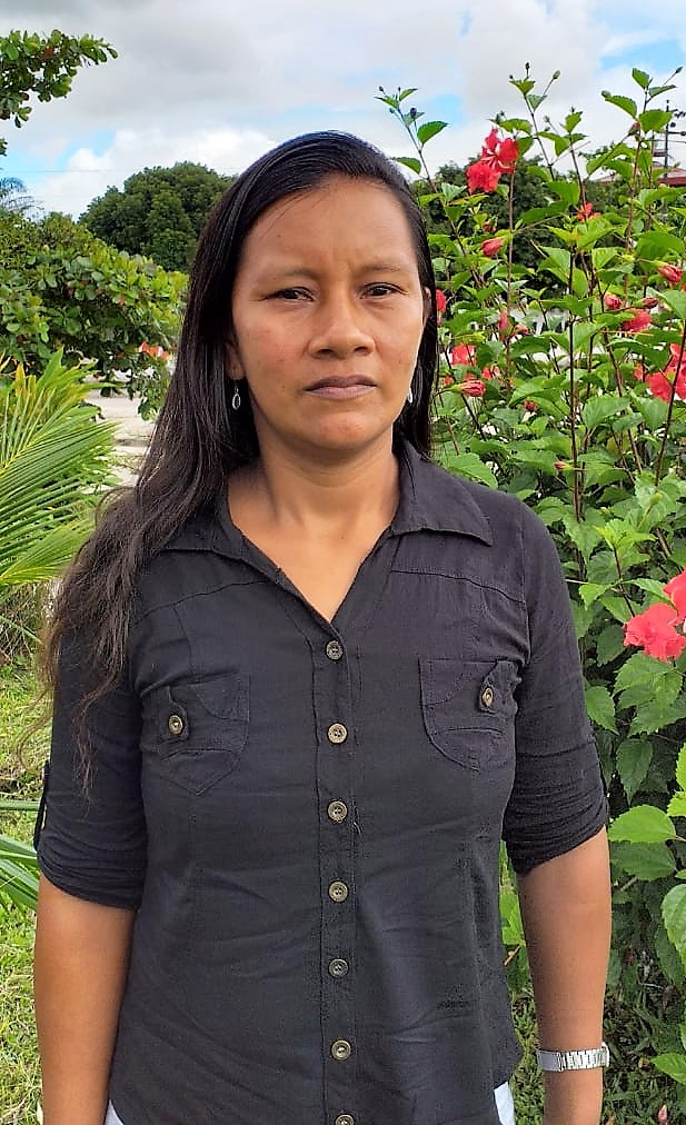 Liz Chicaje, líder de la comunidad indígena Bora de Paucarquillo, Pebas, Loreto, Perú. Trabaja por los derechos indígenas, la protección de los bosques y la preservación de la biodiversidad amazónica. En 2019 ganó el Premio Franco-Alemán de Derechos Humanos y Estado de Derecho que se otorgó a 15 personas en el mundo y Liz fue una de ellas.